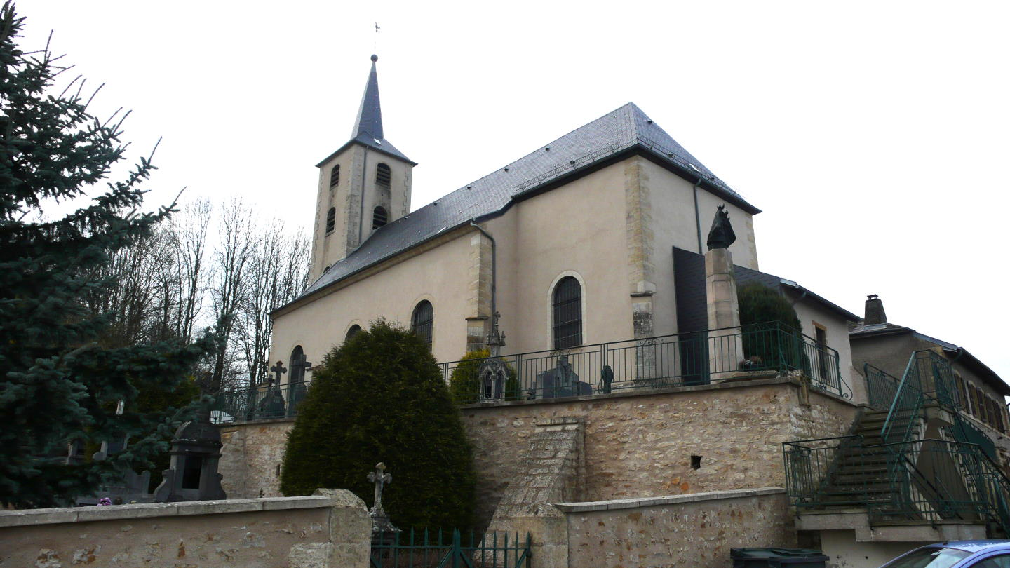 Kierch Kanfen .